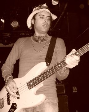 Peter Denton - deuxième bassiste des Kooks et chanteur guitariste des Paris Trading photo prise au Nouveau Casino le 6 septembre 2006 Photo de Sandra CARPENTIER